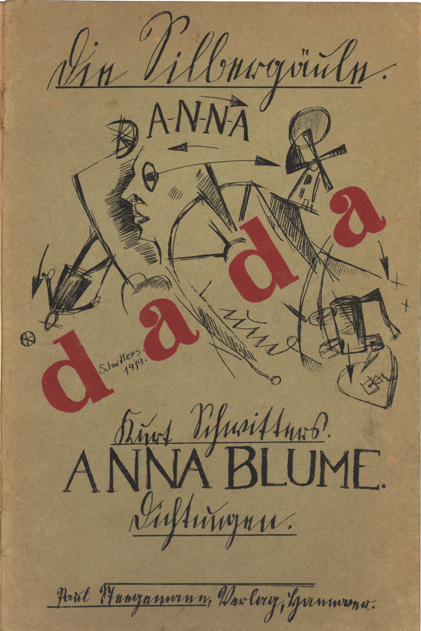 Kurt Schwitters (1919) Anna Blume. Dichtungen, Hannover: Paul Steegemann Verlag.